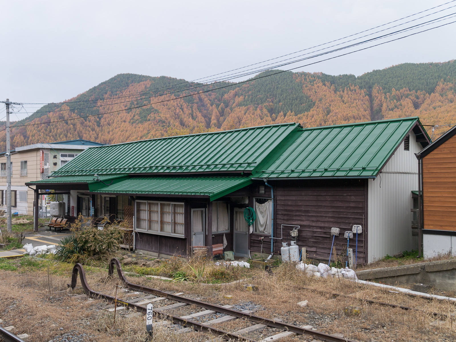 JR東日本小海線信濃川上駅、長野県南佐久郡川上村。